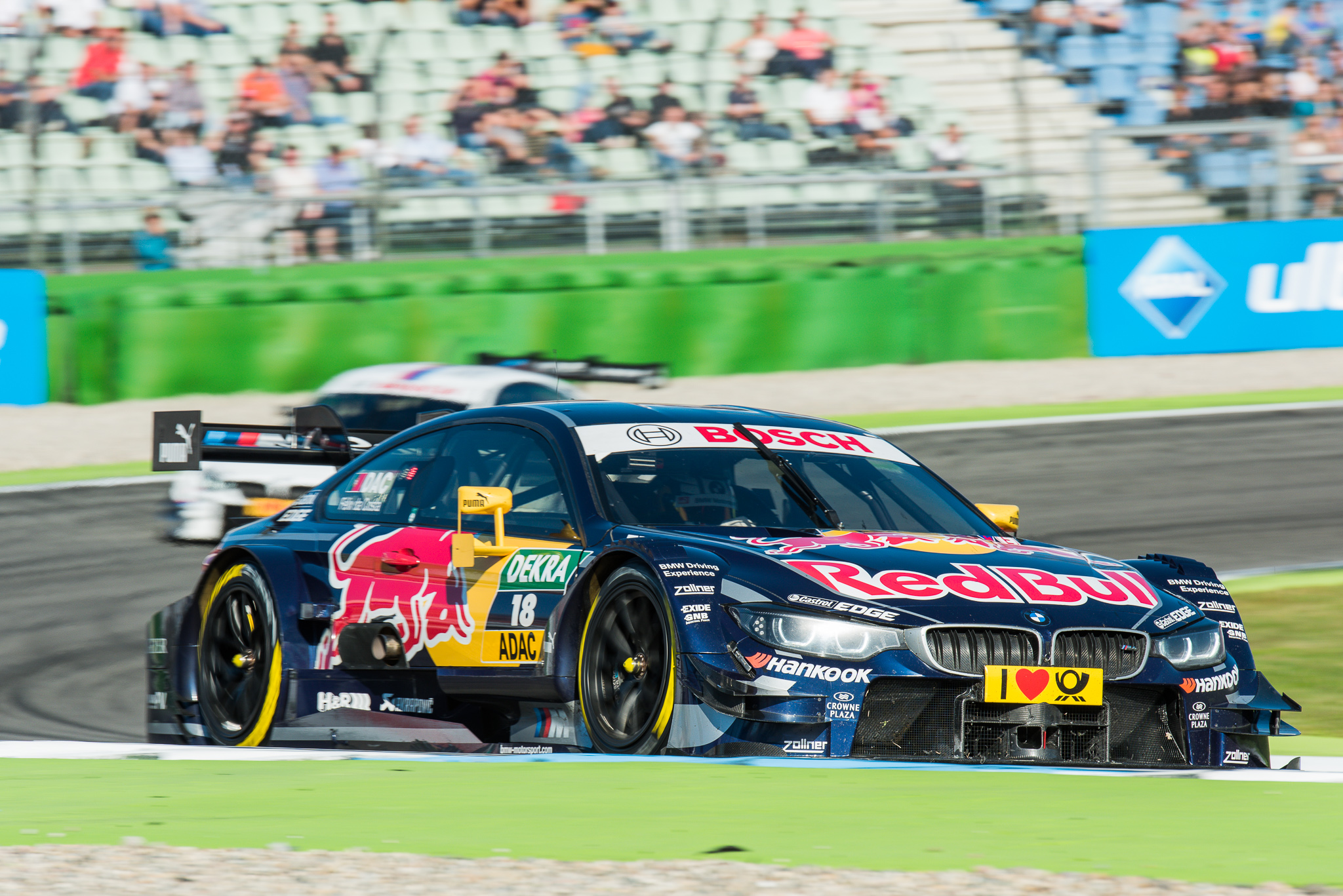 Antonio Felix da Costa,DTM,Deutsche Tourenwagen Masters,Hockenheimring,MTEK GmbH,Motorsport,Red Bull BMW M4 DTM